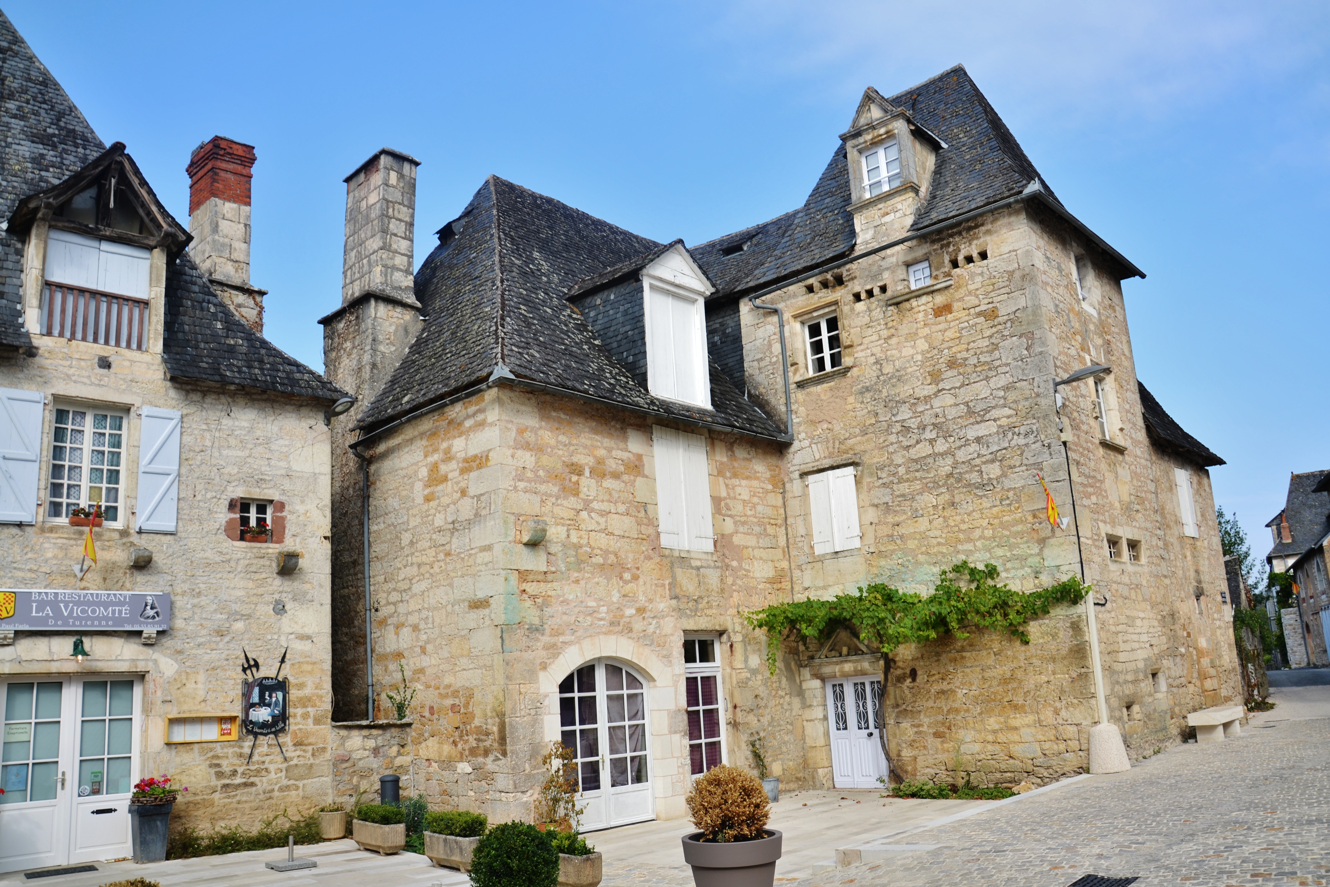 Maisons dans le centre-bourg historique de Turenne (Corrèze, France)